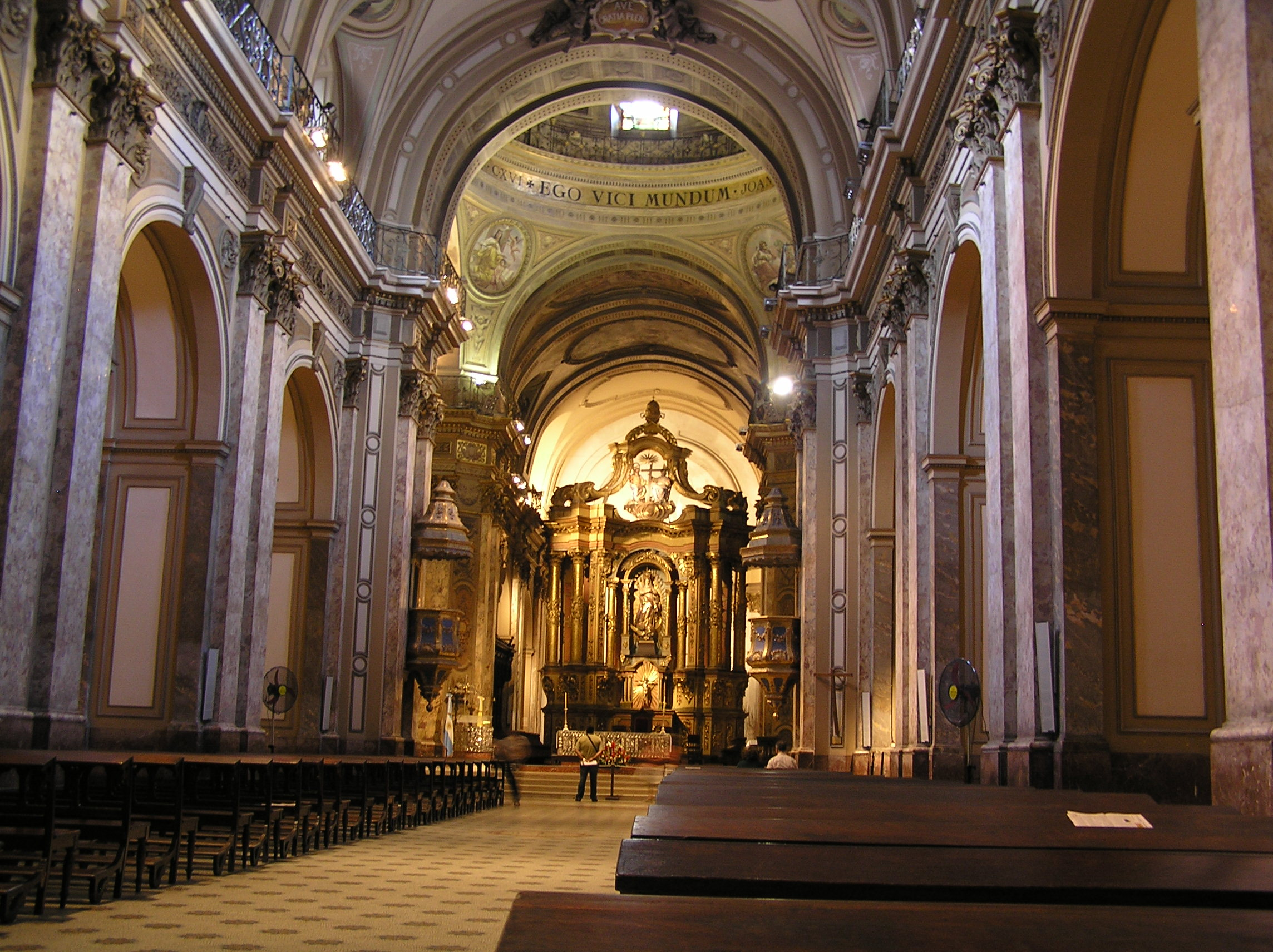 Interior de la Catedral Metropolitana de Buenos Aires Author: Mr. Tickle Date: January 28th, 2006 Place: Buenos Aires (Argentina)